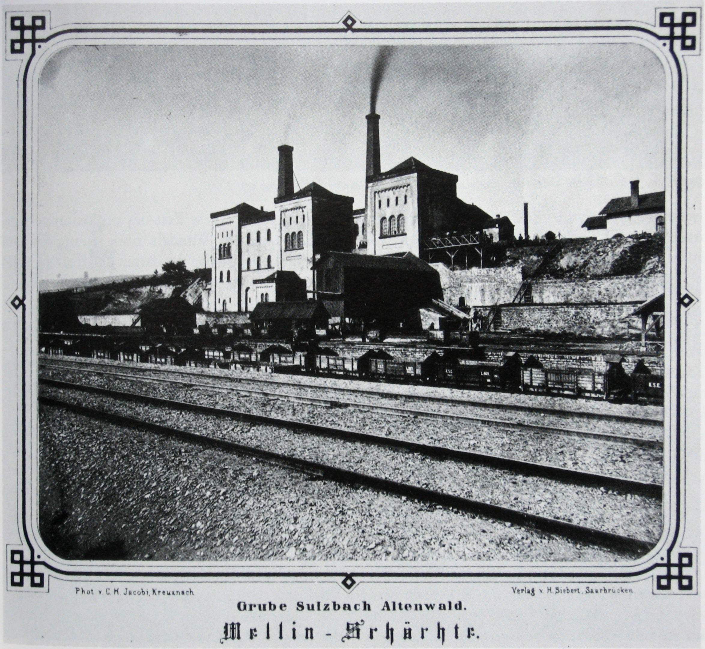 Grube in Sulzbach (Saar)